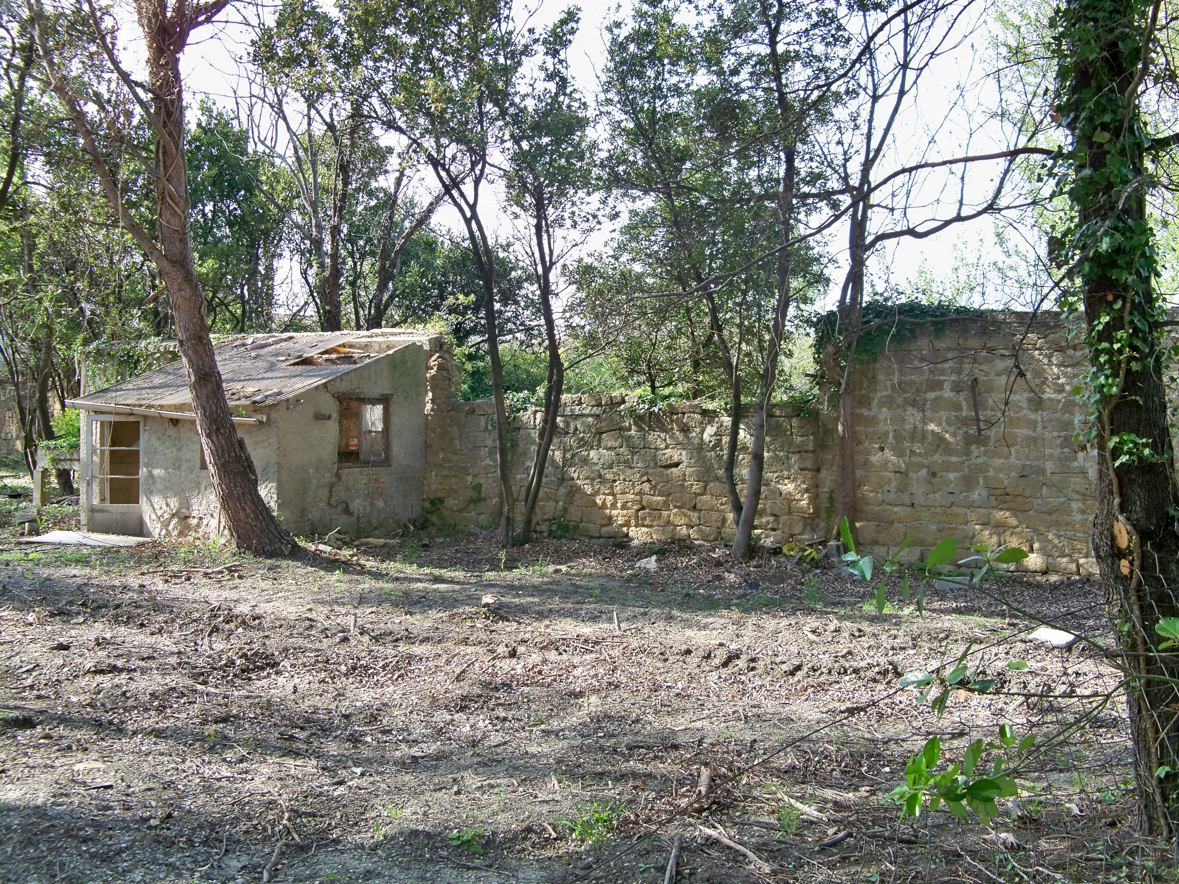 restes mur d'enceinte du palais des papes de Sorgues